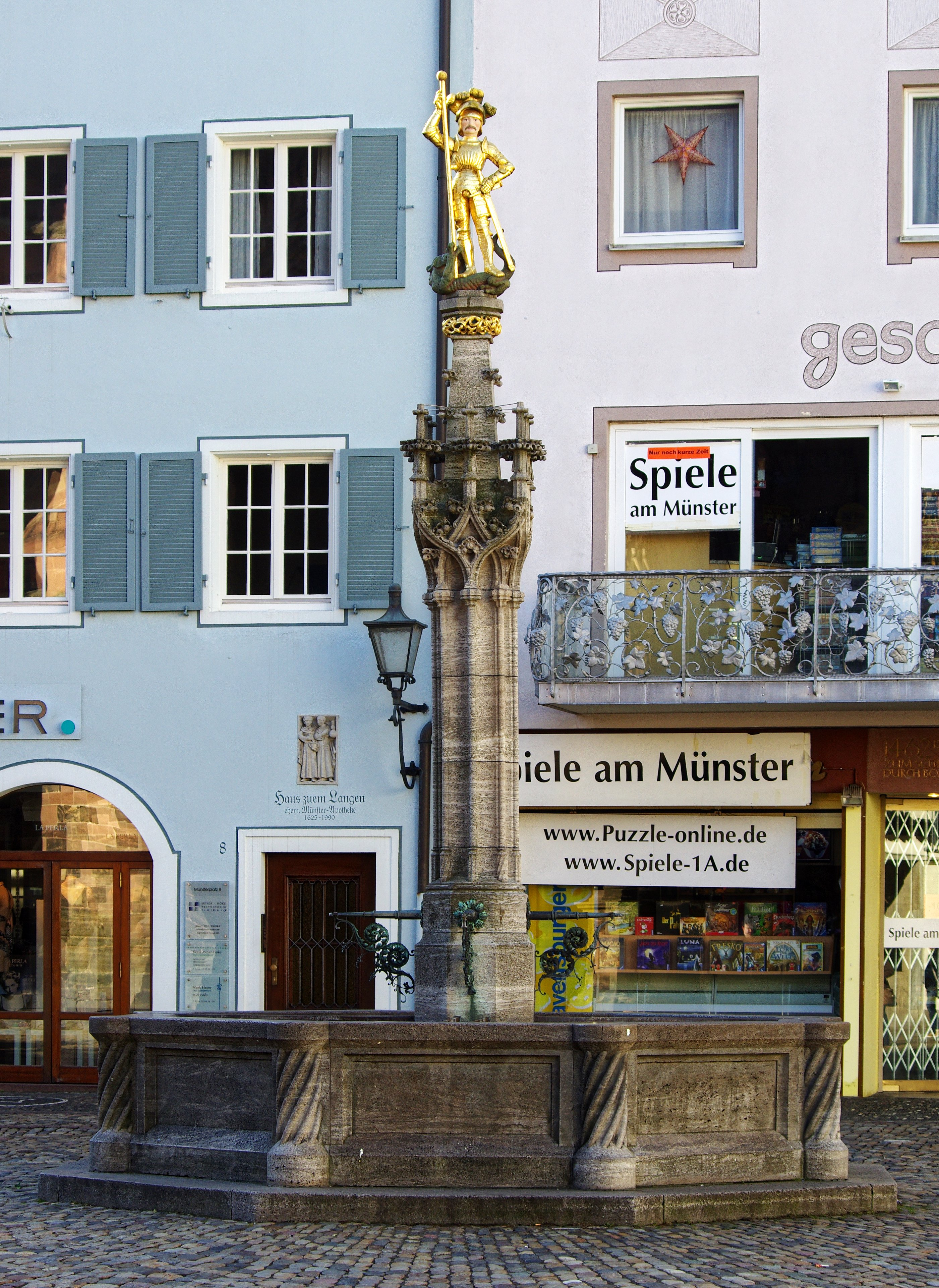 St.-Georgs-Brunnen von Carl Anton Meckel auf dem Freiburger Münsterplatz